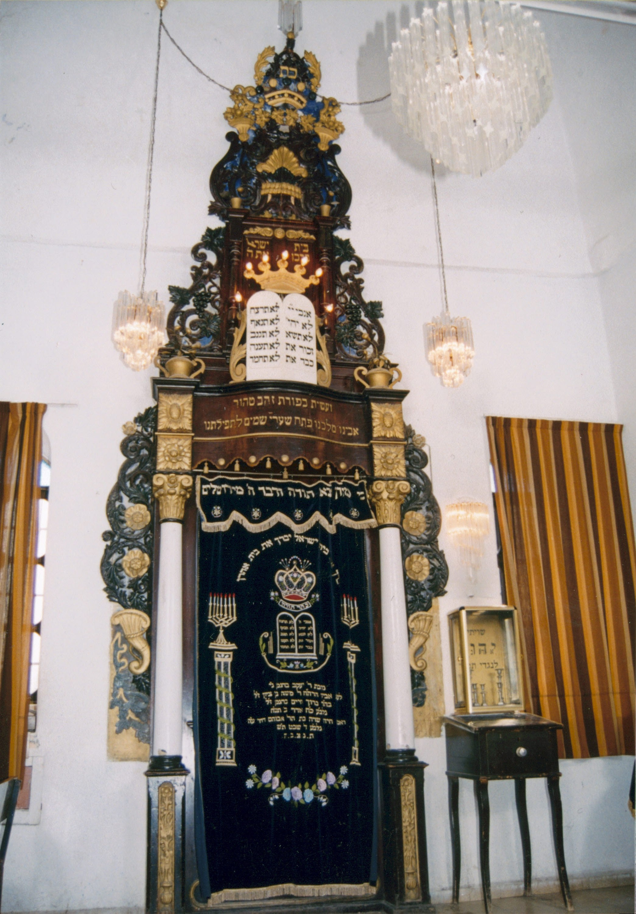 ארון הקודש בבית הכנסת של ראשוני החסידים בטבריה